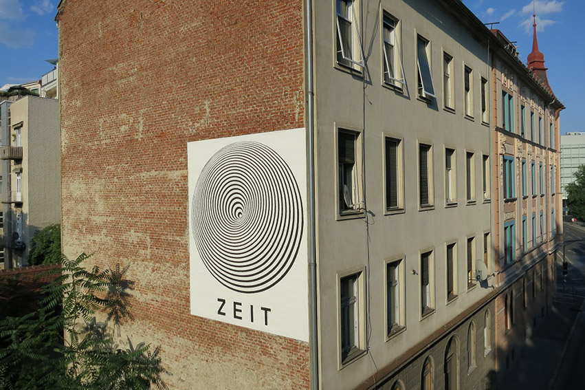 Dispersion, Zweiglgasse 4, 8020 Graz, Projekt IN ALLE NETZE 2013, © bwolf.at